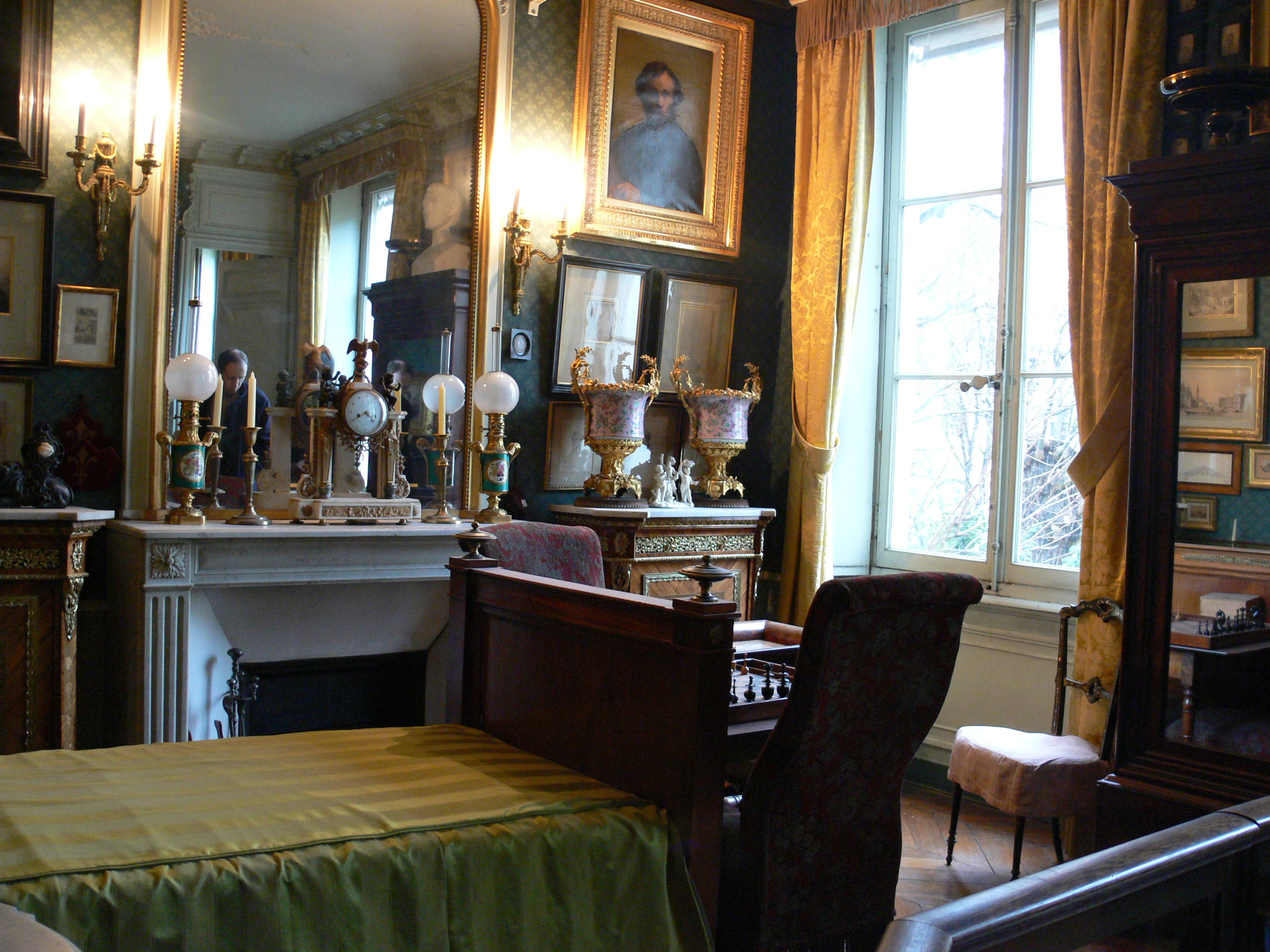 Musée national Gustave-Moreau, Paris